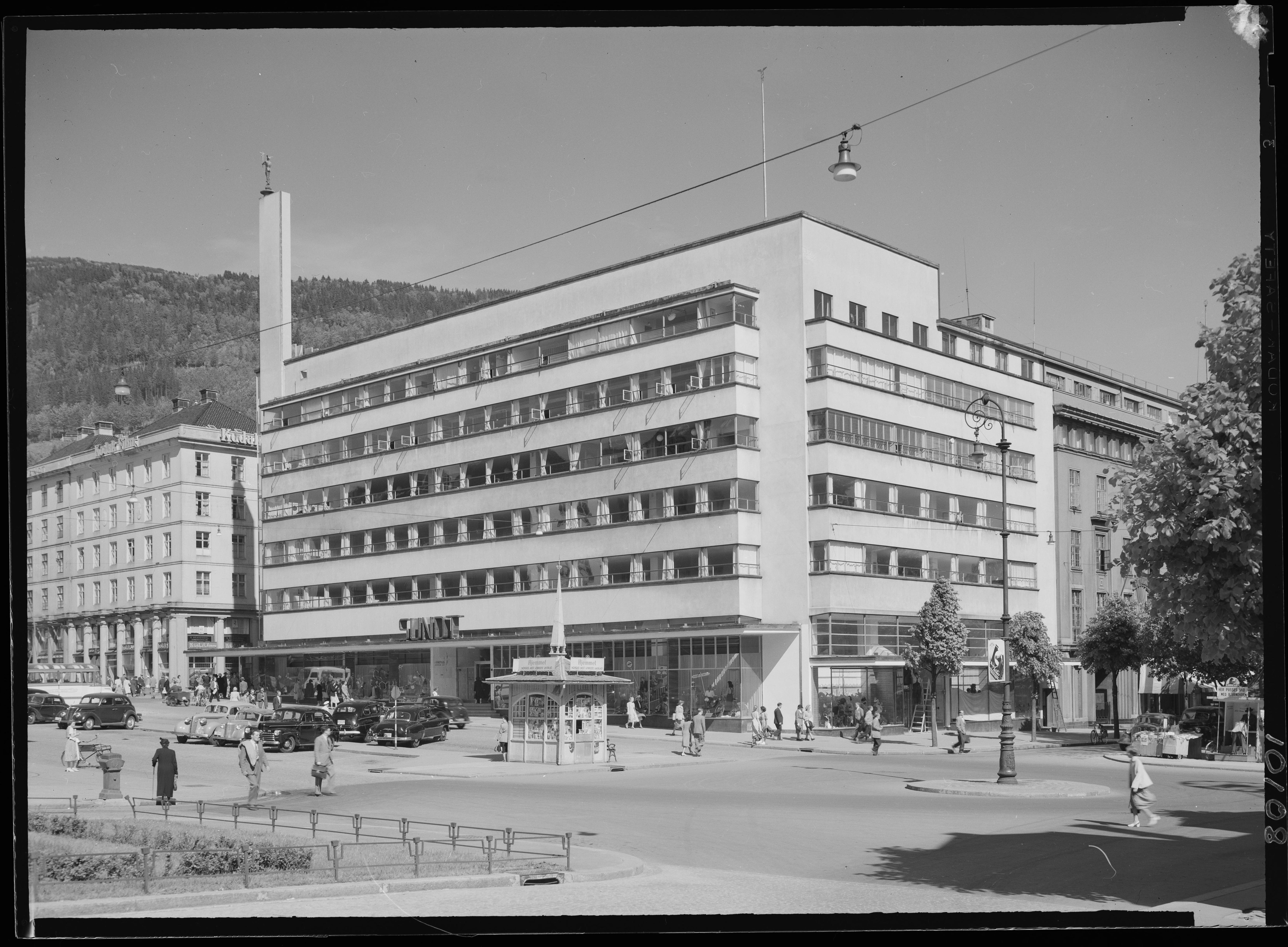 Bildet er hentet fra Nasjonalbibliotekets bildesamling. Anmerkninger til bildet var: Fotograf : ukjent Bergen, Bergen, Hordaland